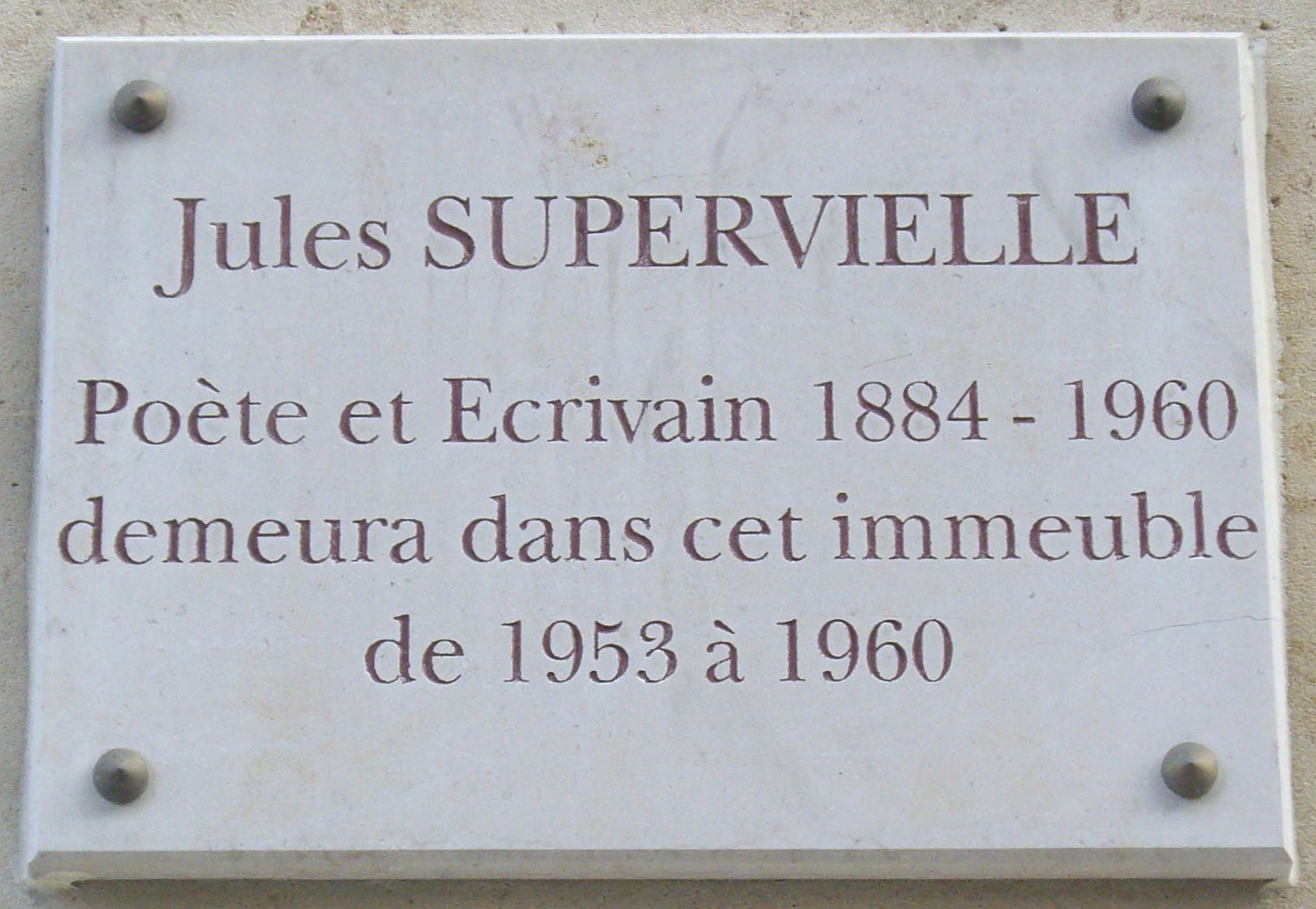 Plaque commémorative, 11 quai Louis-Blériot, Paris 16e. « Jules Supervielle, poète et écrivain, 1884-1960, demeura dans cet immeuble de 1953 à 1960. »